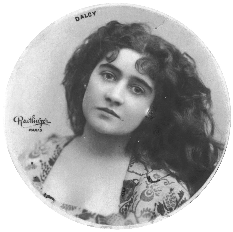 Mlle Dalcy, théâtre de la Renaissance (s'agit-il vraiment de Jeanne d'Alcy ? à confirmer...)